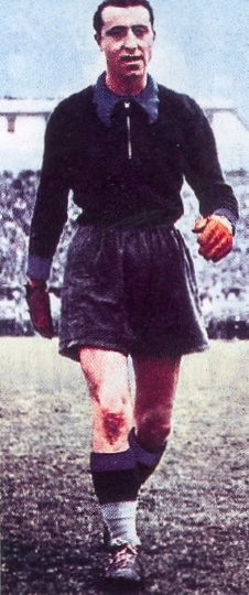 Il portiere di calcio italiano Carlo Ceresoli all'Ambrosiana-Inter negli anni 30 del XX secolo.